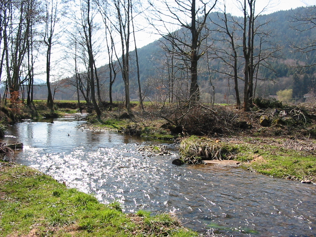 Le Taintroué, peu avant la confluence avec la Meurthe à Saint-Dié-des-Vosges